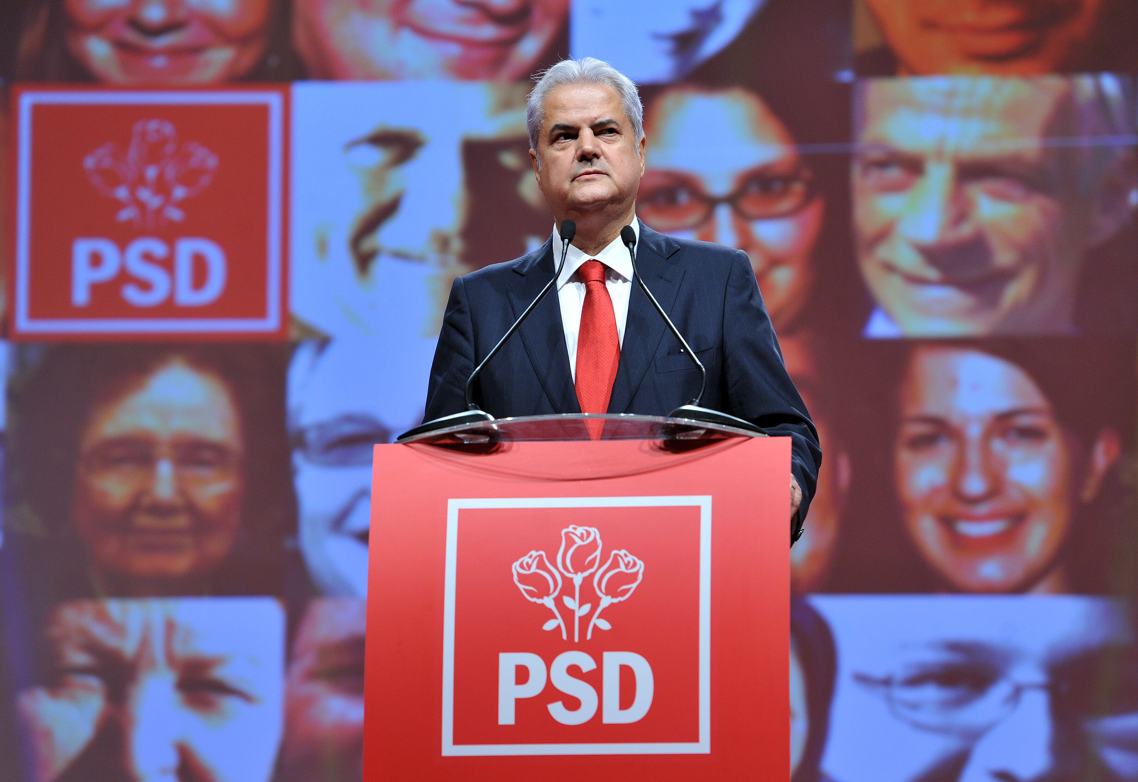 Adrian Nastase la Consiliul National al PSD